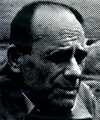 Foto di Andrzej Mostowski